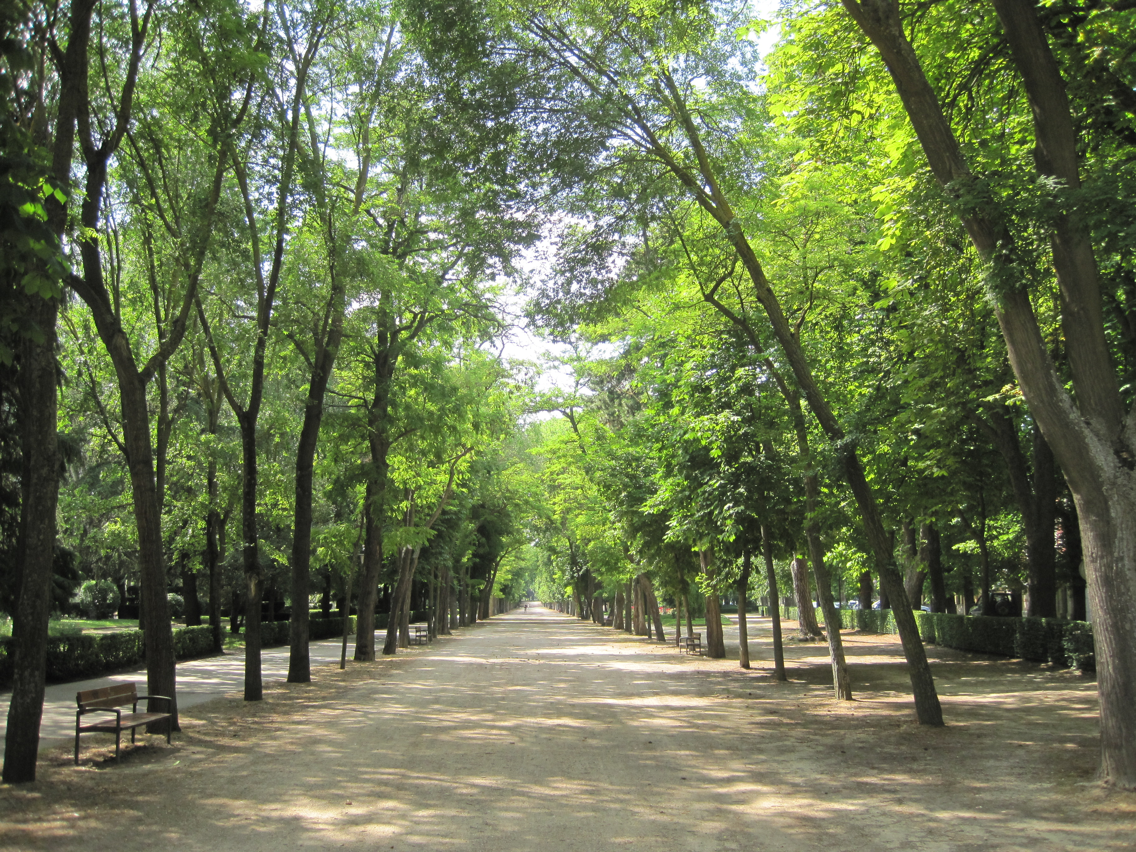 Paseo de la Isla, vista de un extremo a otro.